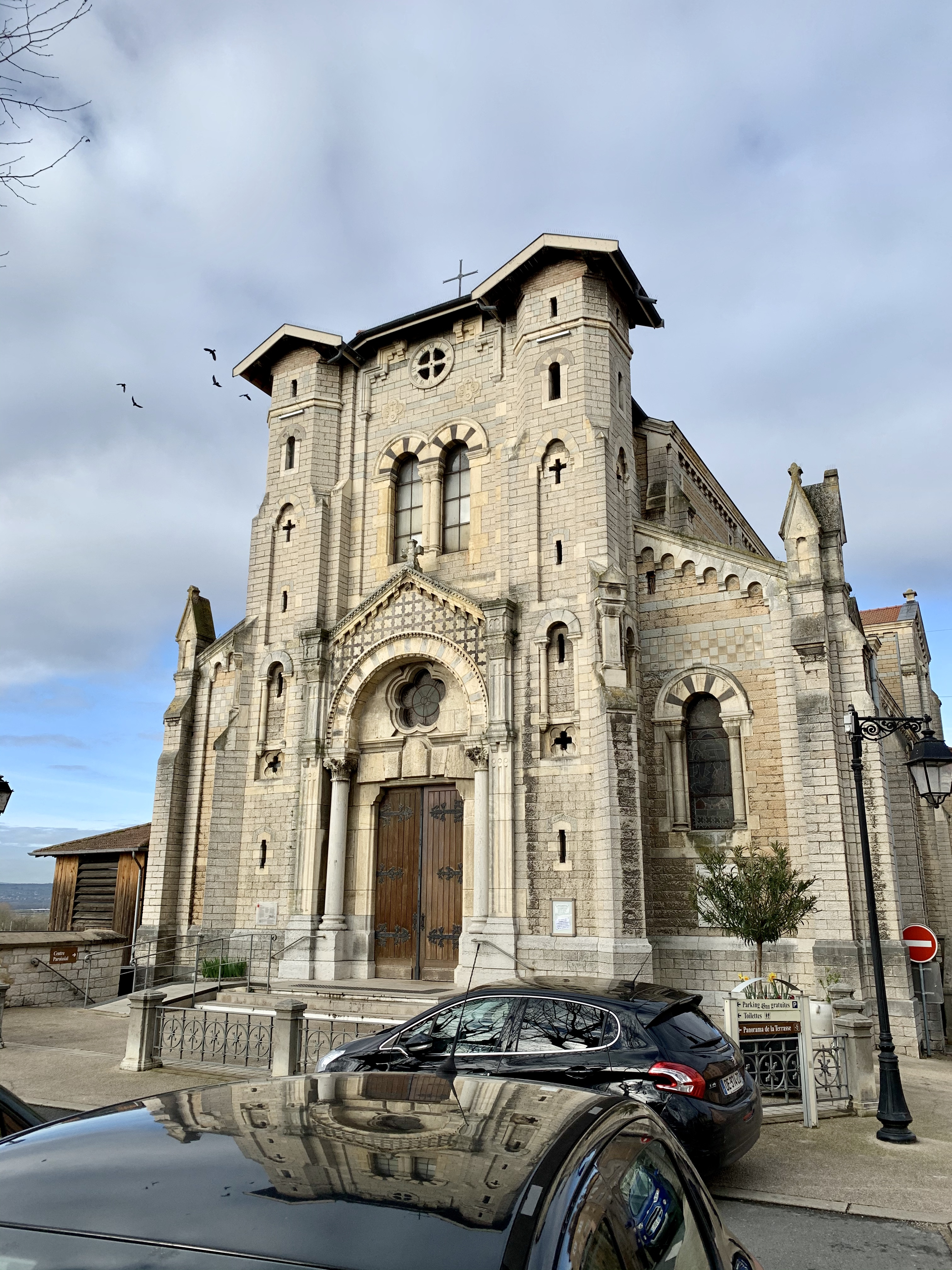 Façade avant, à l'Est.